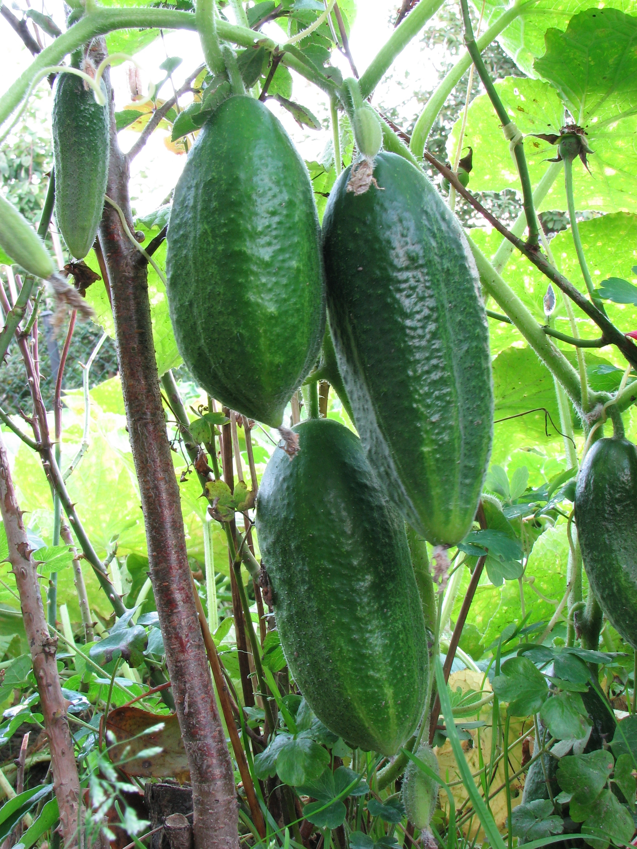 ogórki, Cucumis sativus